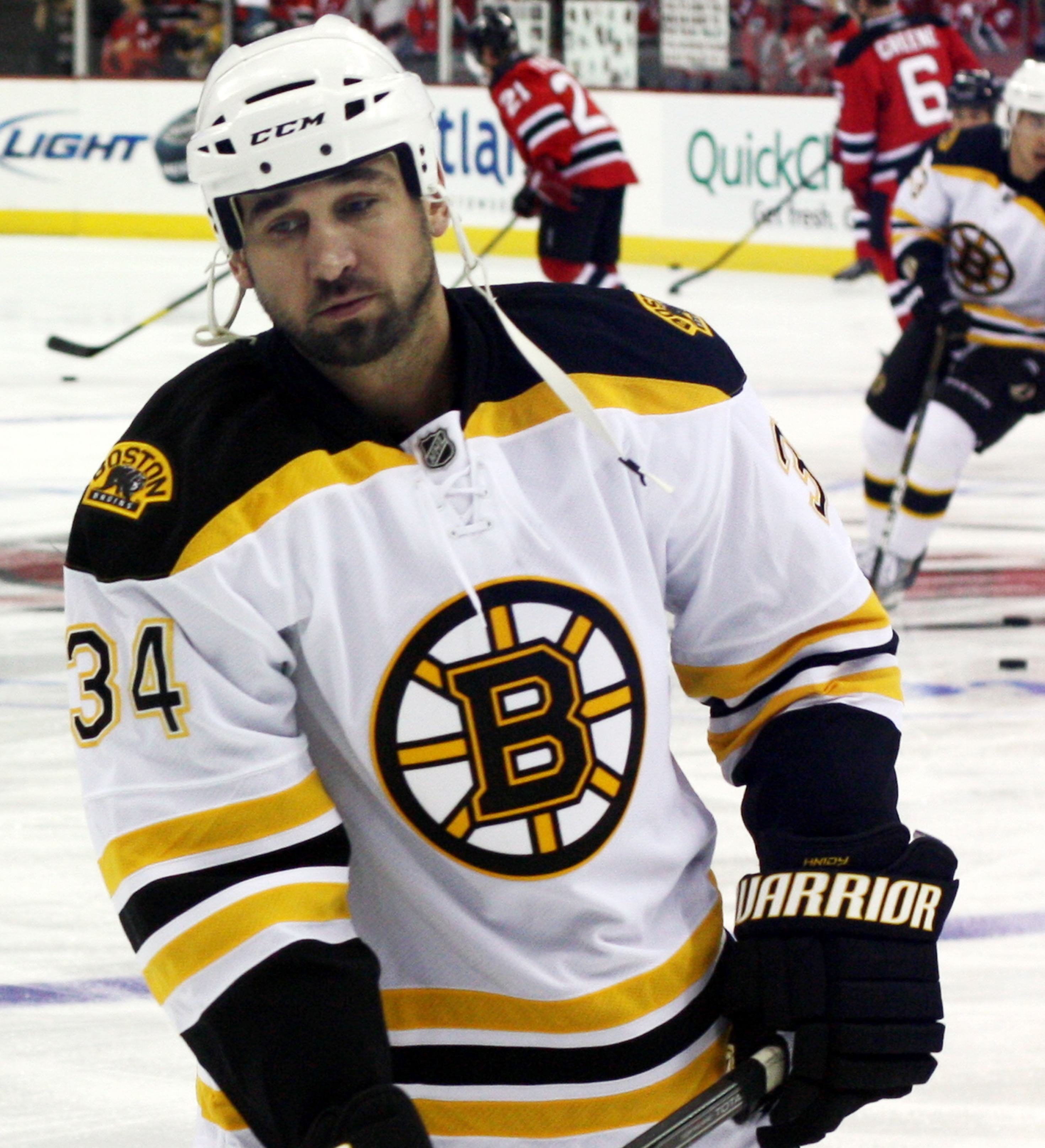 Hnidy in 2011.